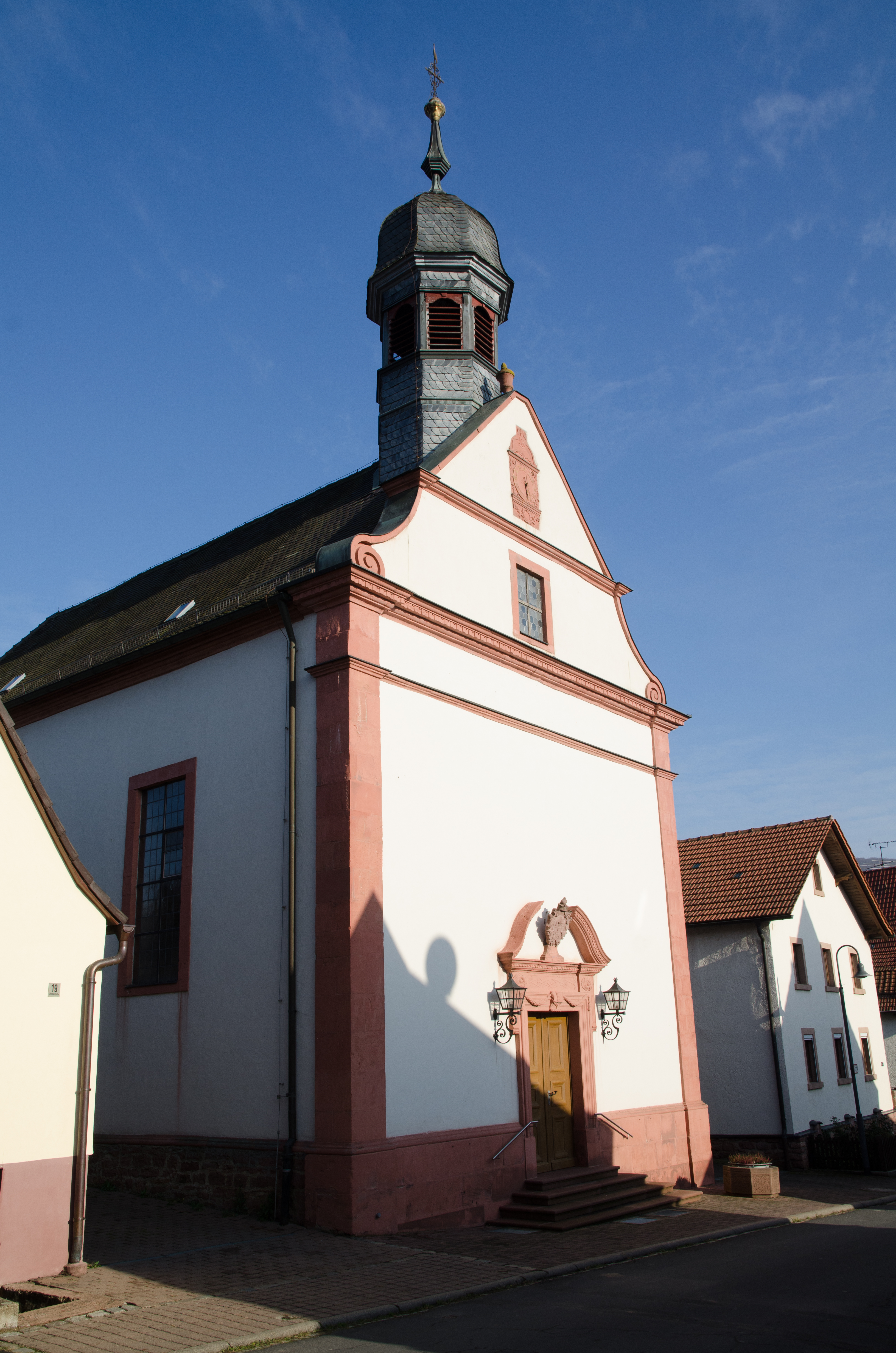 Gemünden, Schaippach, Kreuzeserhöhung